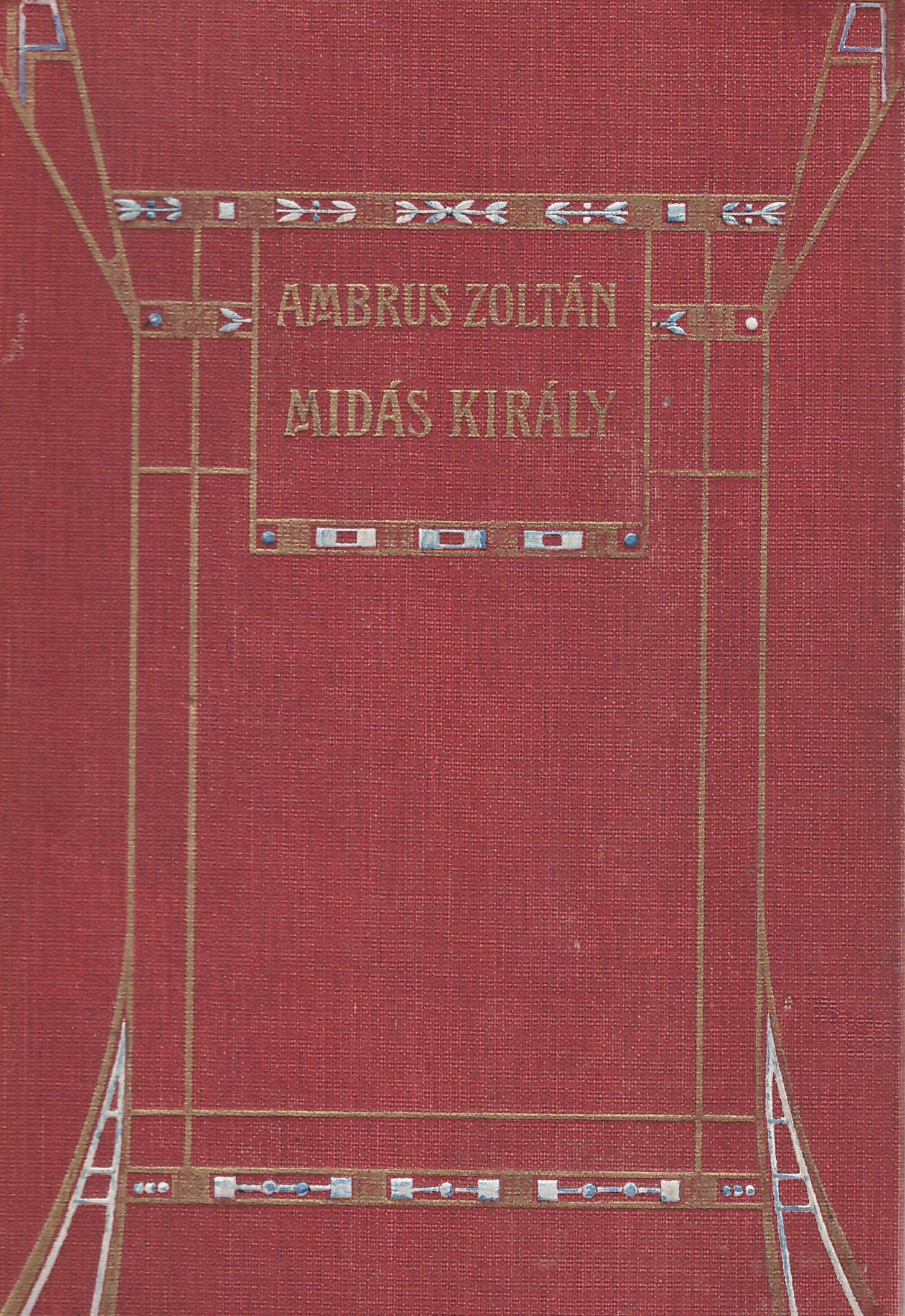 Ambrus Zoltán: Midas király (1910-es évek)